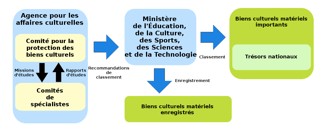 Japon : schéma de la procédure de classement des trésors nationaux.